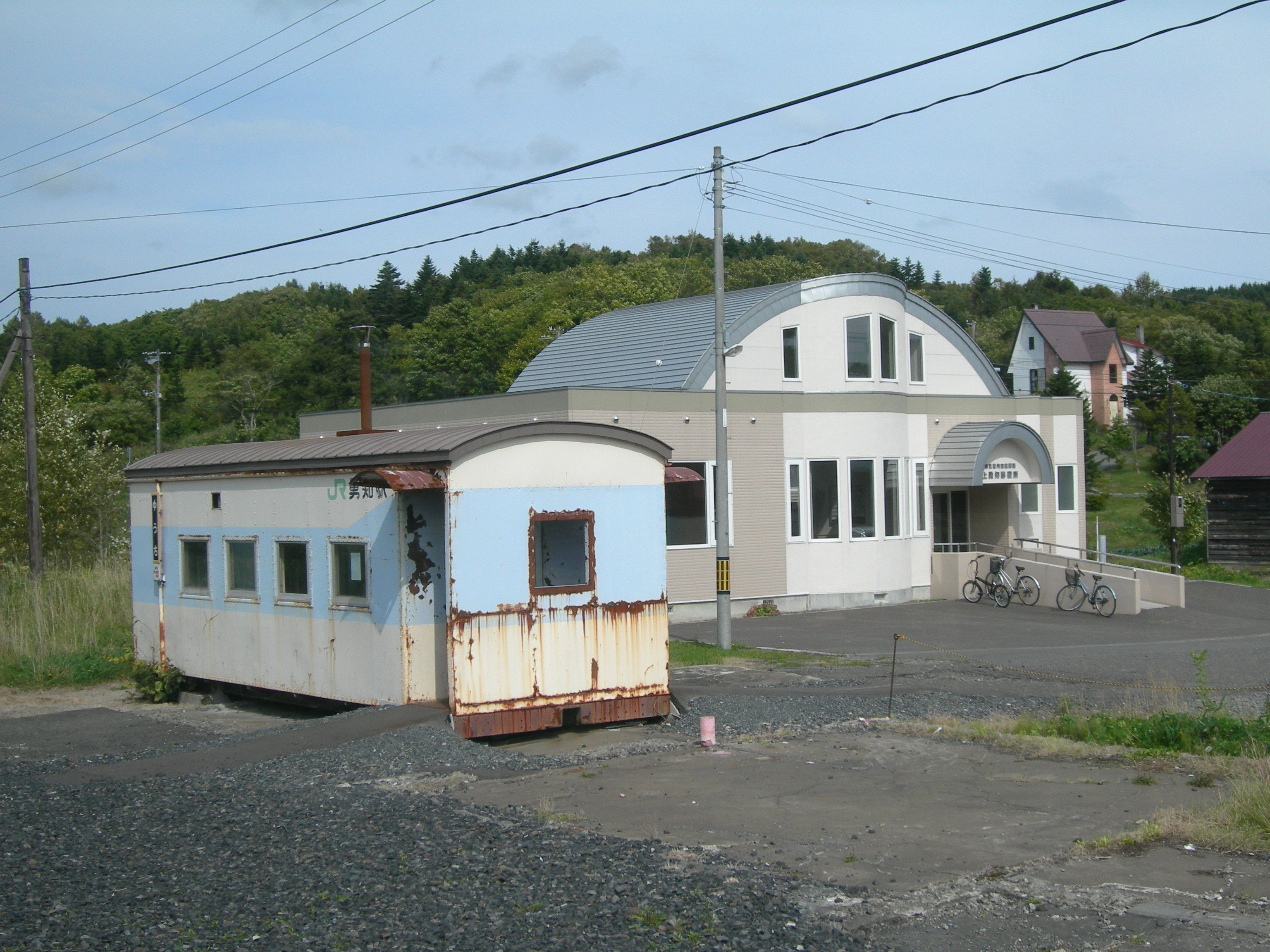 勇知駅駅舎(後ろにあるのは上勇知診療所)